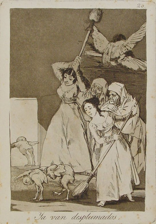 Capricho nº 20: Ya van desplumados de Goya, serie Los Caprichos